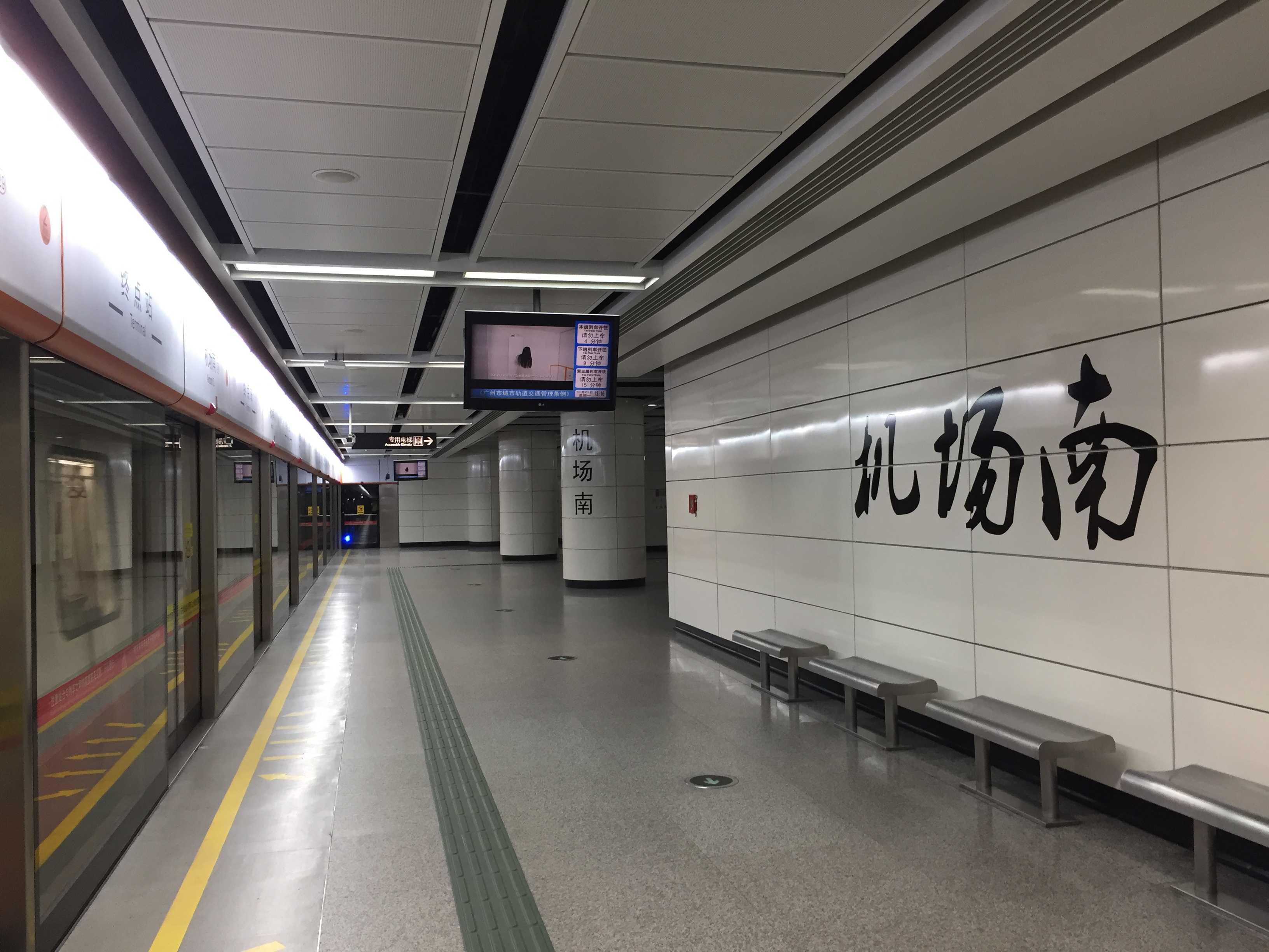 广州地铁机场南站